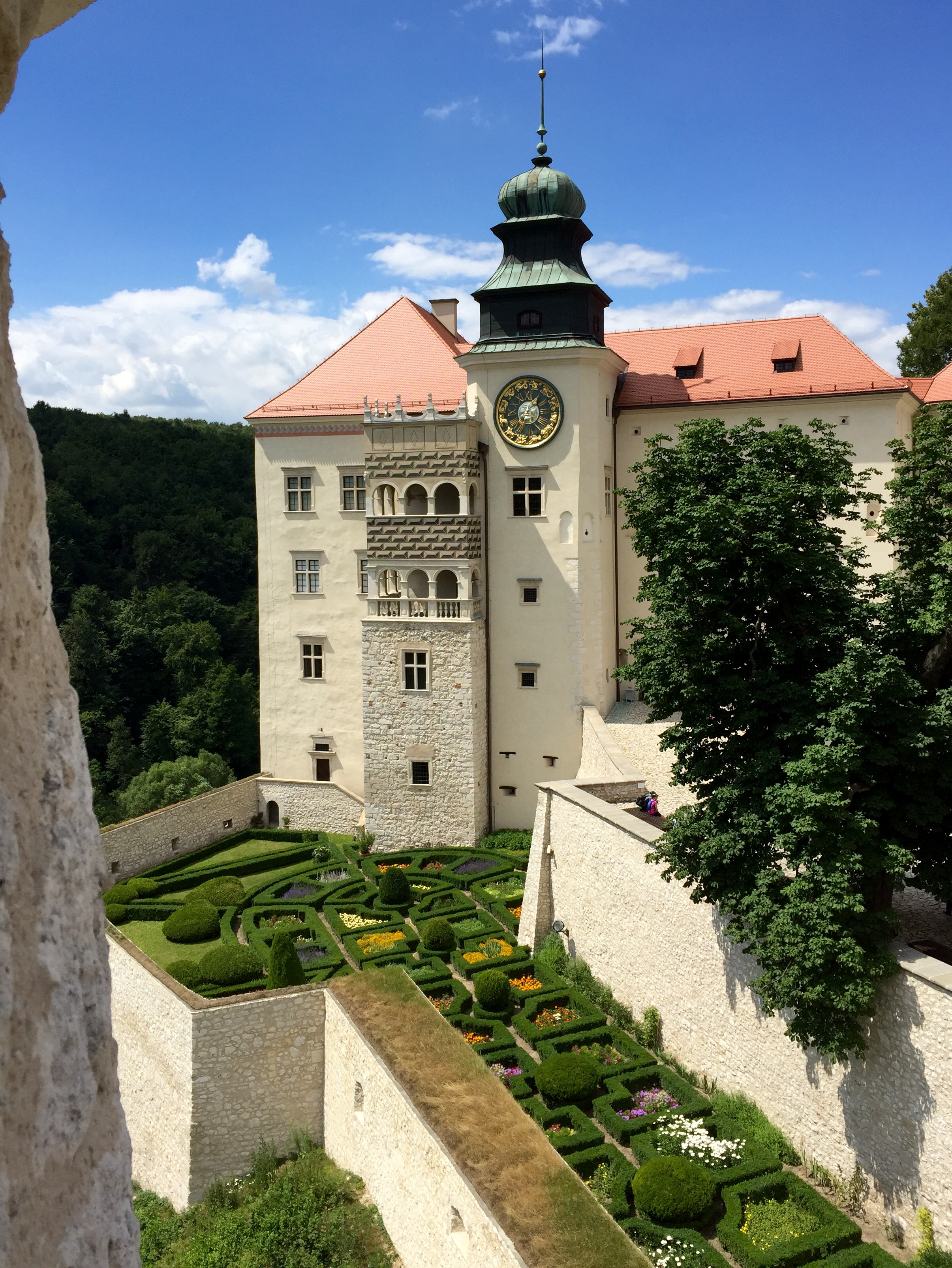 Sułoszowa, zespół zamkowy